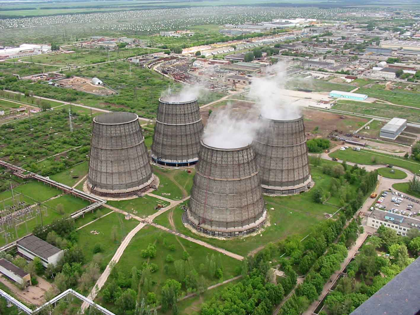 ТЭЦ ВАЗа